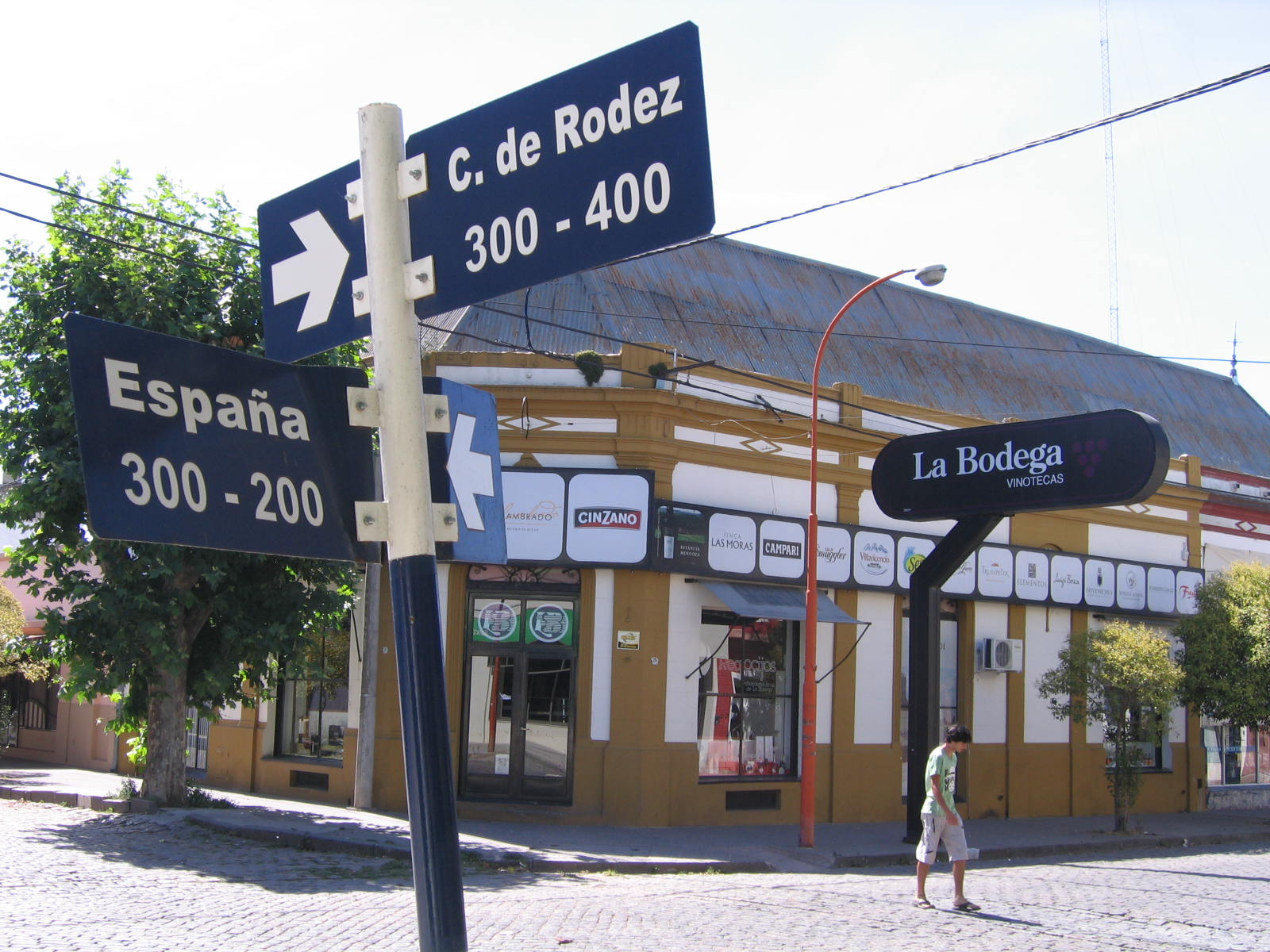 Rue Espana et rue de Rodez - PigüéOccitan : Carriera Espana e carriera de Rodés - Pigüé